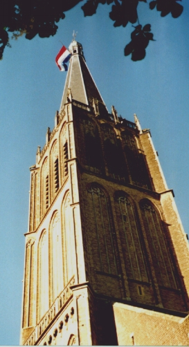 Toren Martinikerk